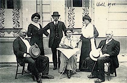 Claude Lebois (assis, à droite) et sa fille Lucie (assise, au centre), août 1911.